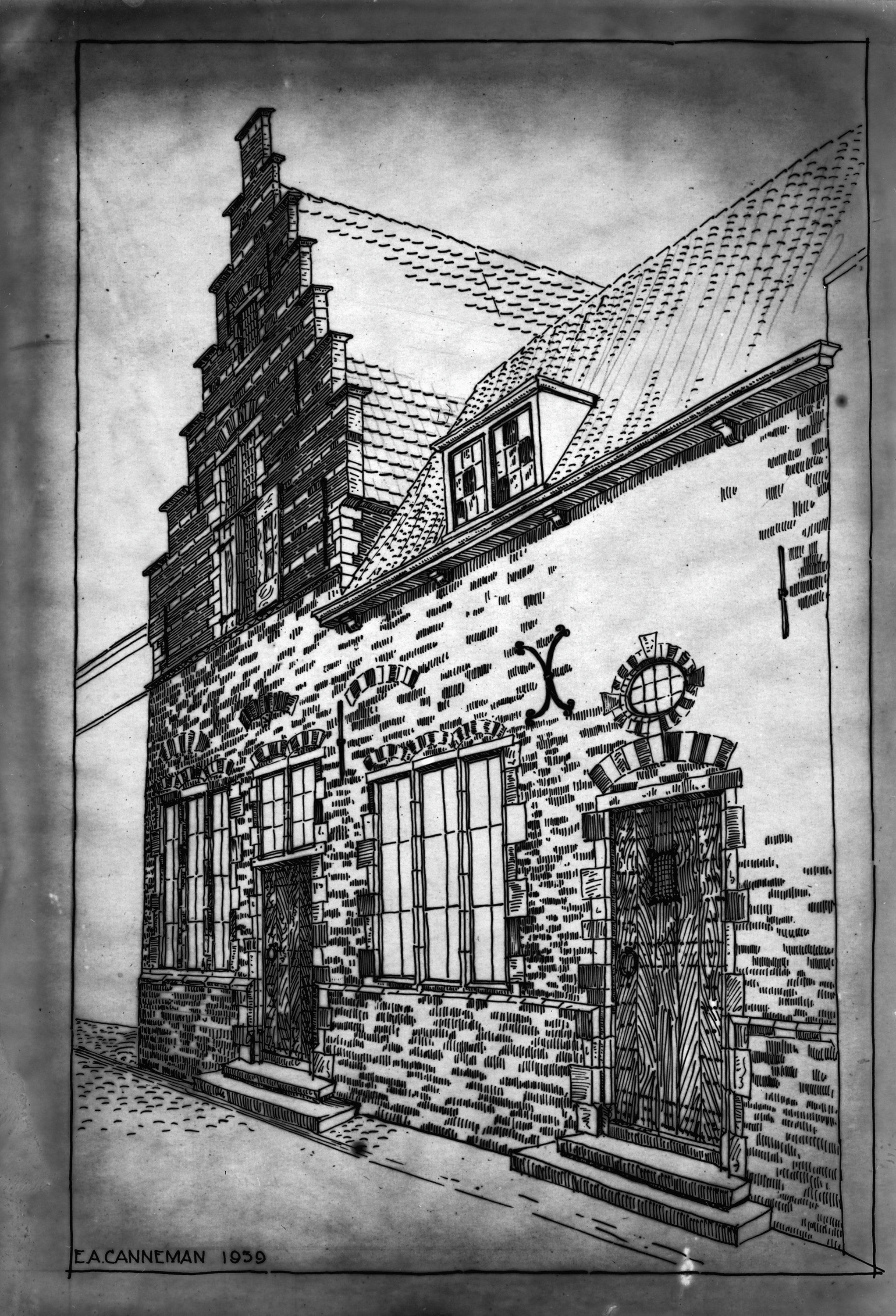 naar tekening van E.A.Canneman